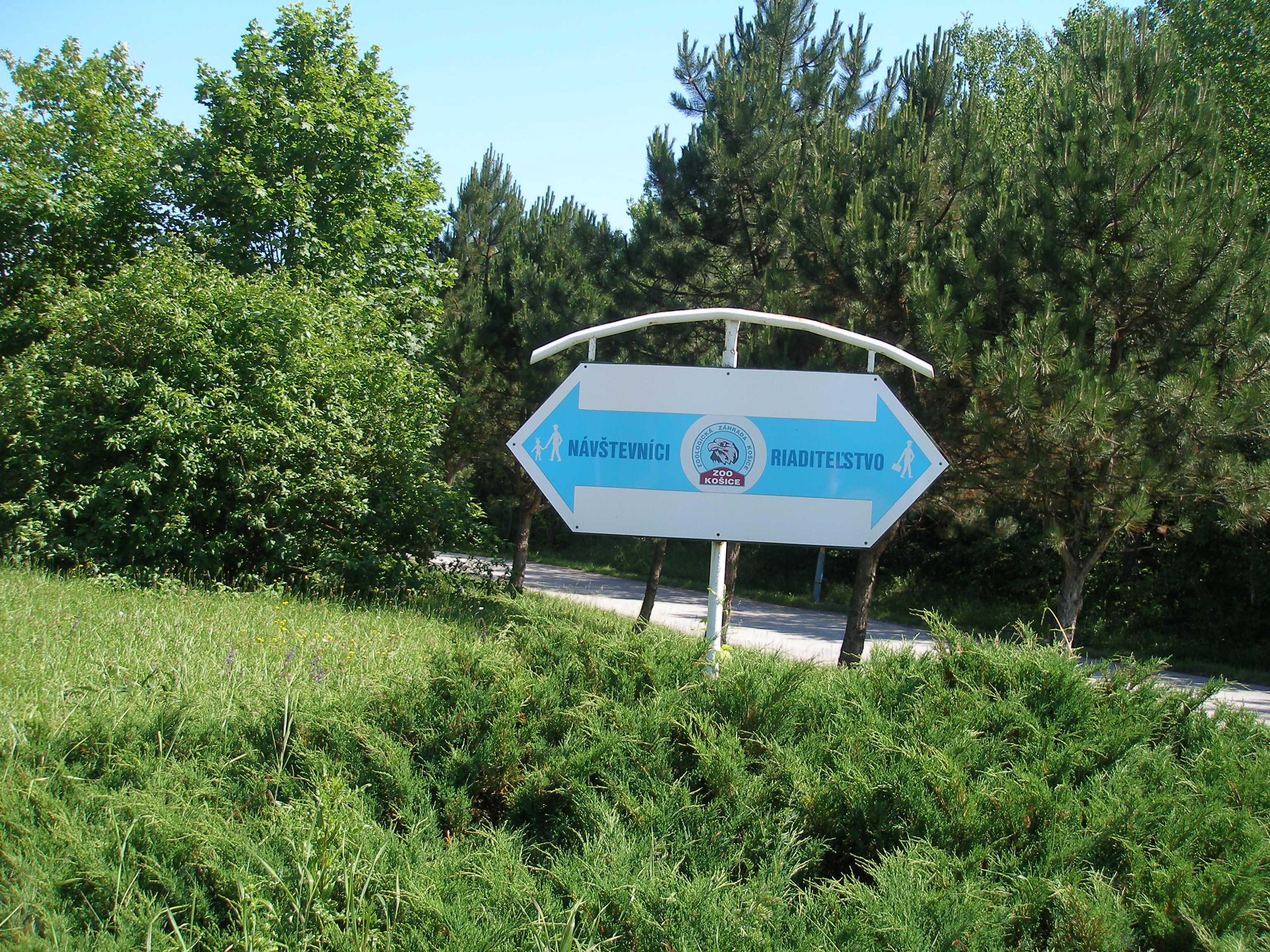 Areál zoologickej záhrady Košice - Kavečany